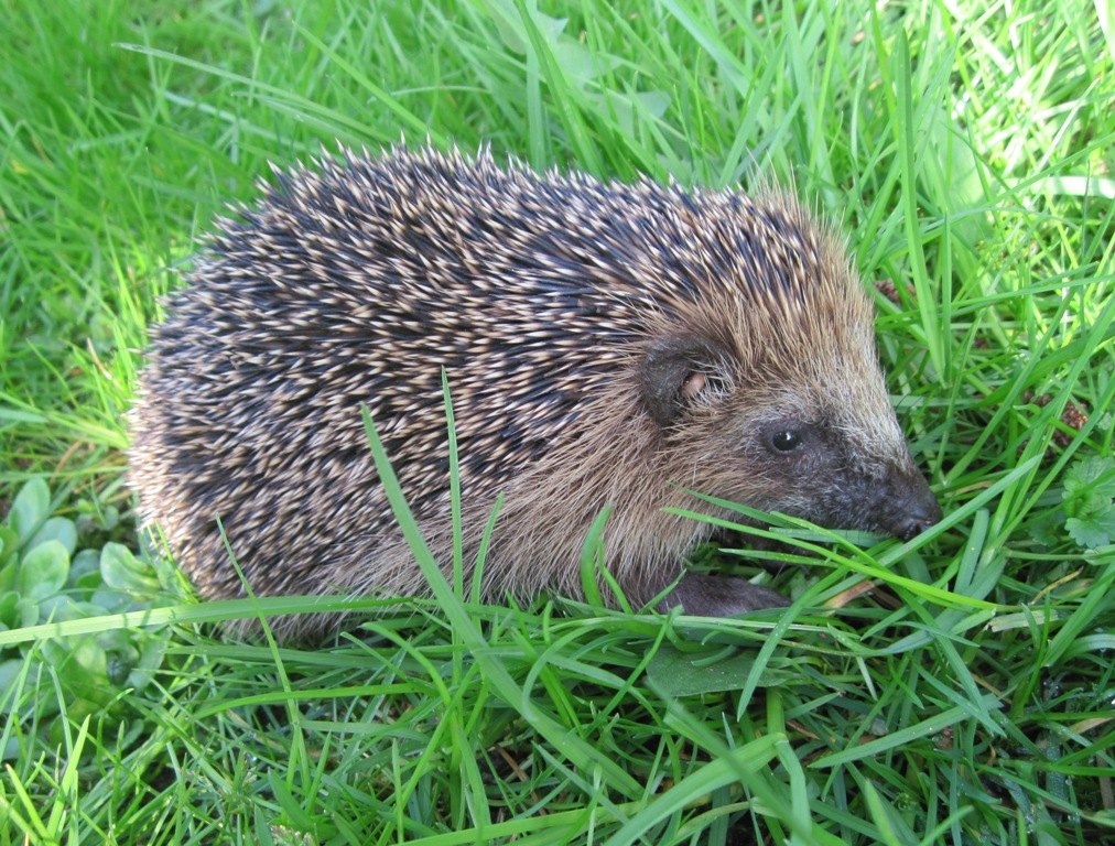 Tagaktiver Stacheligel im Gras